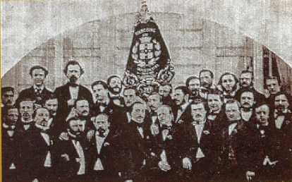 Photographie de la Société Nationale des Orphéonistes Crick-Sicks à son origine posant devant leur drapeau.